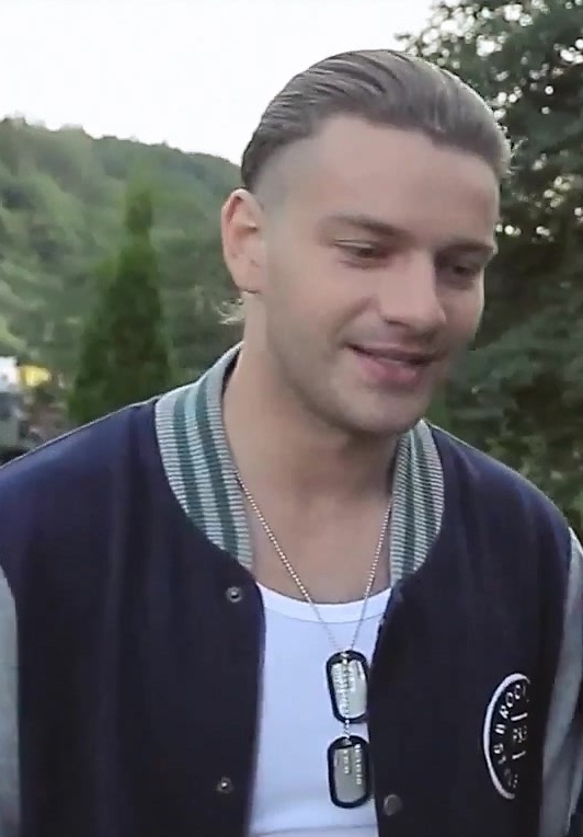 Богдан Юсипчук, український актор